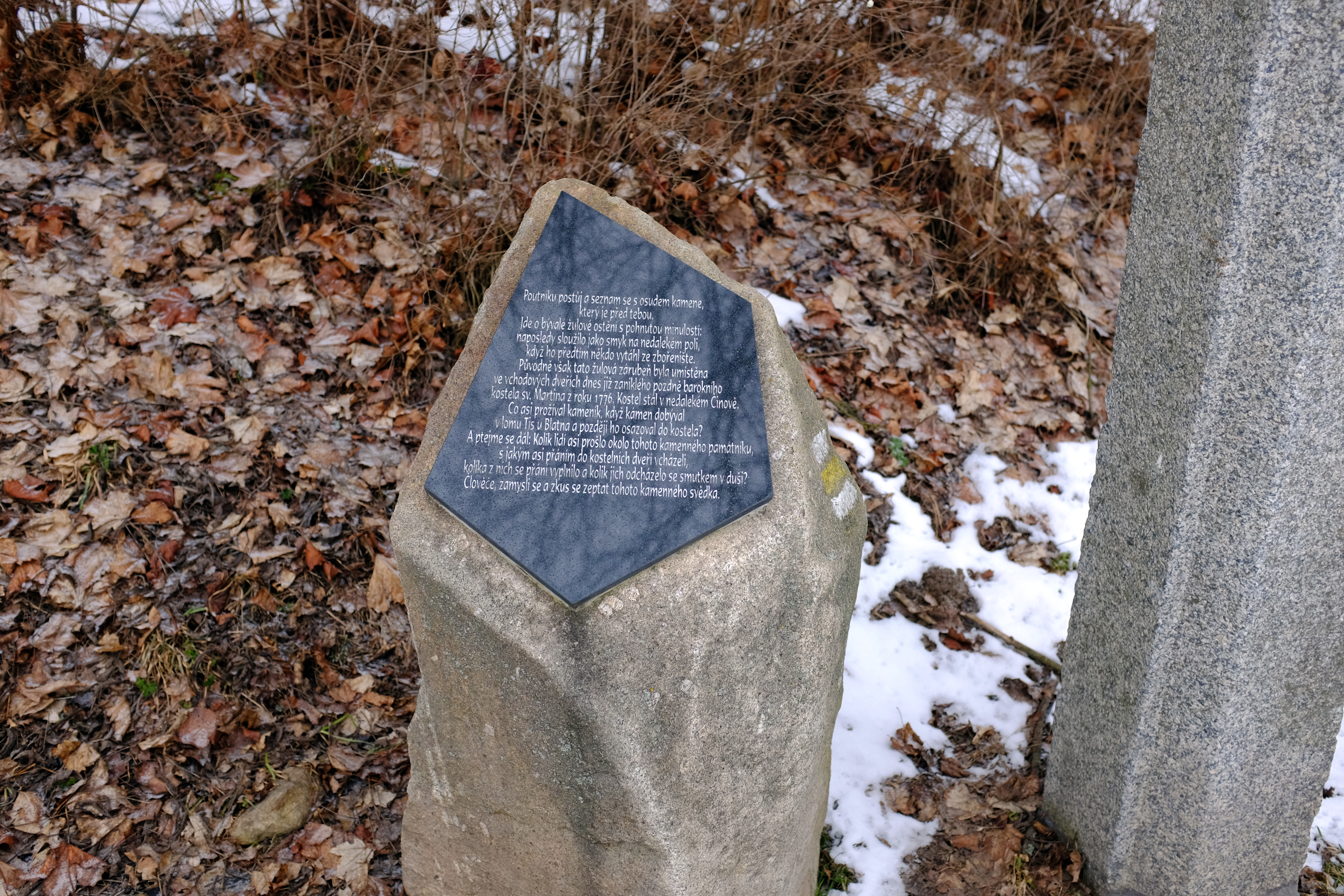 Zaniklá obec Činov, Pomník připomínající zaniklý kostel sv. Martina, stojící při cestě z Andělské Hory do zaniklé osady Štichlův Mlýn